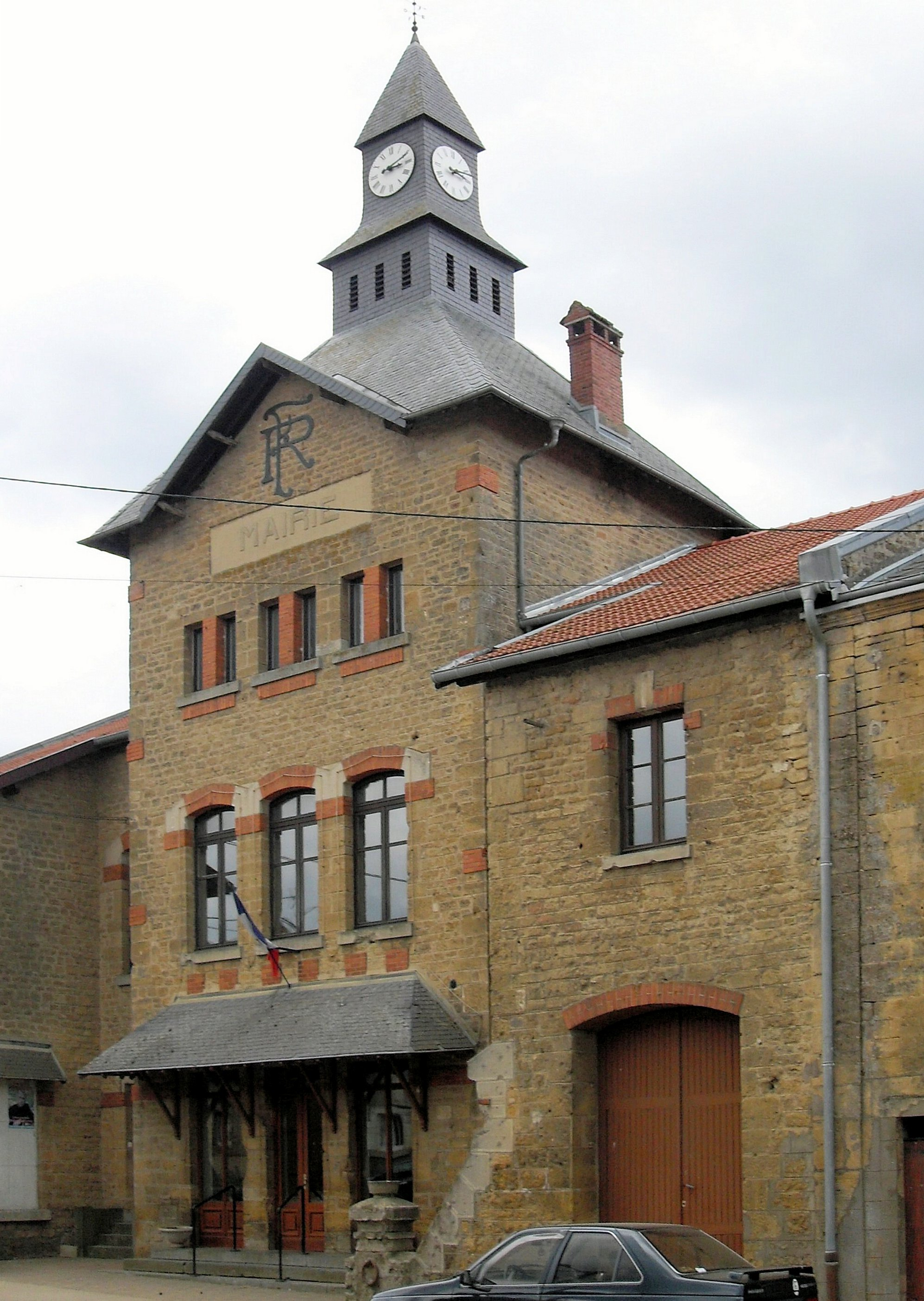 La mairie de Moulins-Saint-Hubert